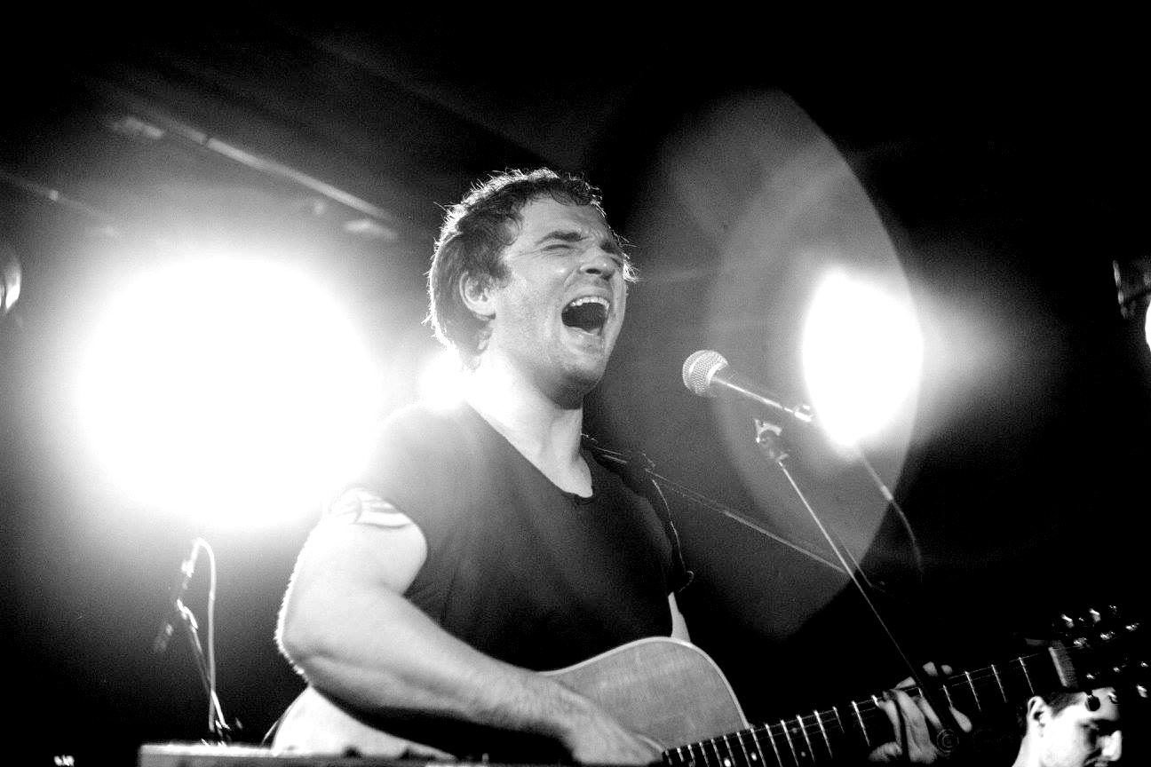 Iker Lauroba